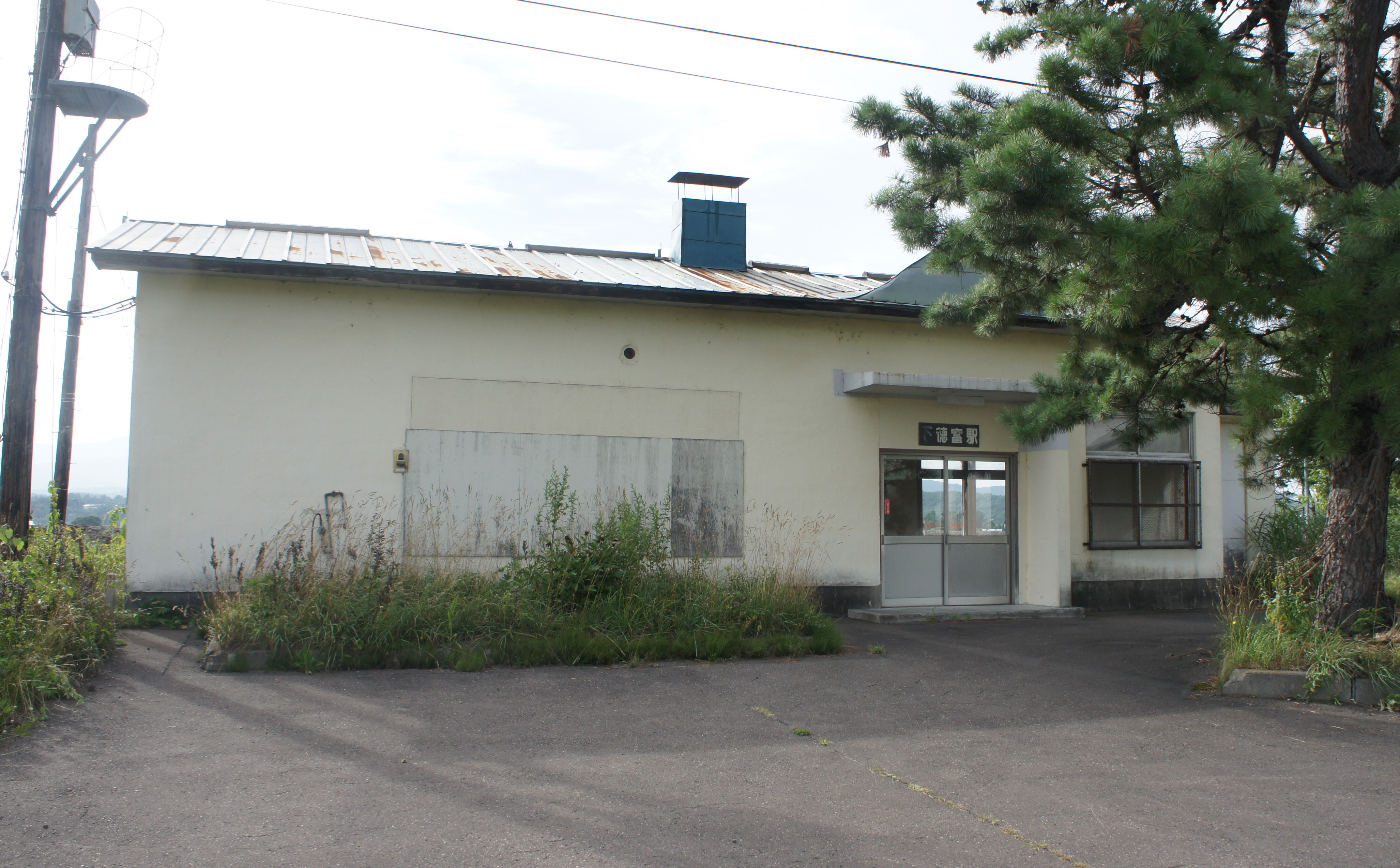 JR札沼線・下徳富駅の駅舎